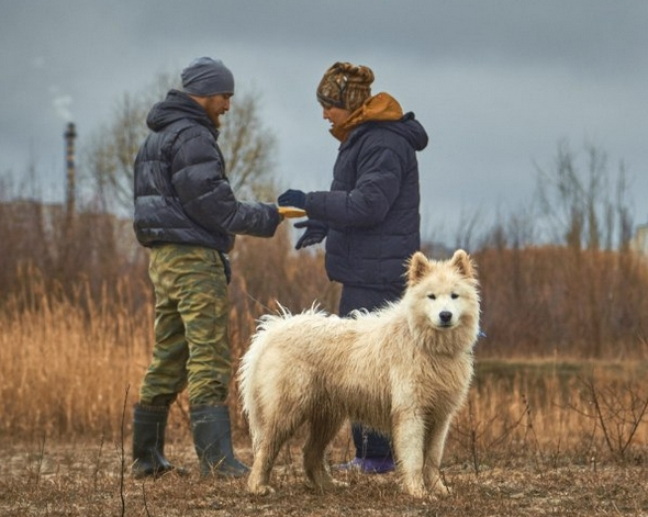 Дрессировка самоеда